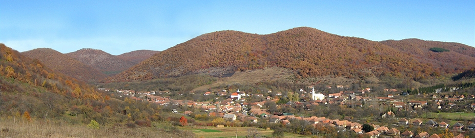 Szögligeti Panorama